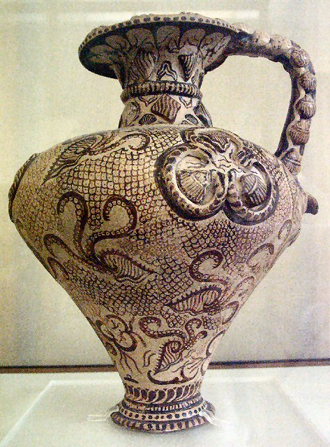 Motiv: Kanne im Meeresstil Ort: Archäologisches Museum, Iráklion, Kreta Aufnahmedatum: August 2004 Fotograf: Agon S. Buchholz (asb) Kamera: Minolta Dimage 7 Hi